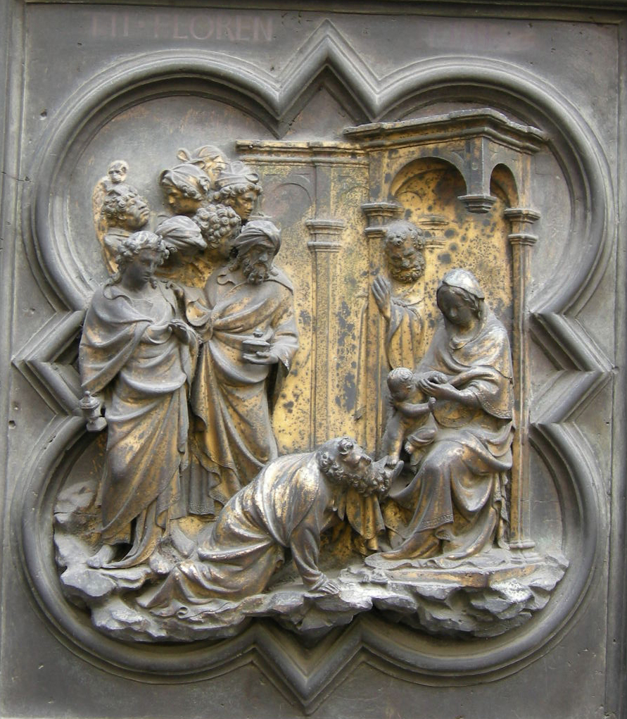 3 Adorazione dei Magi3